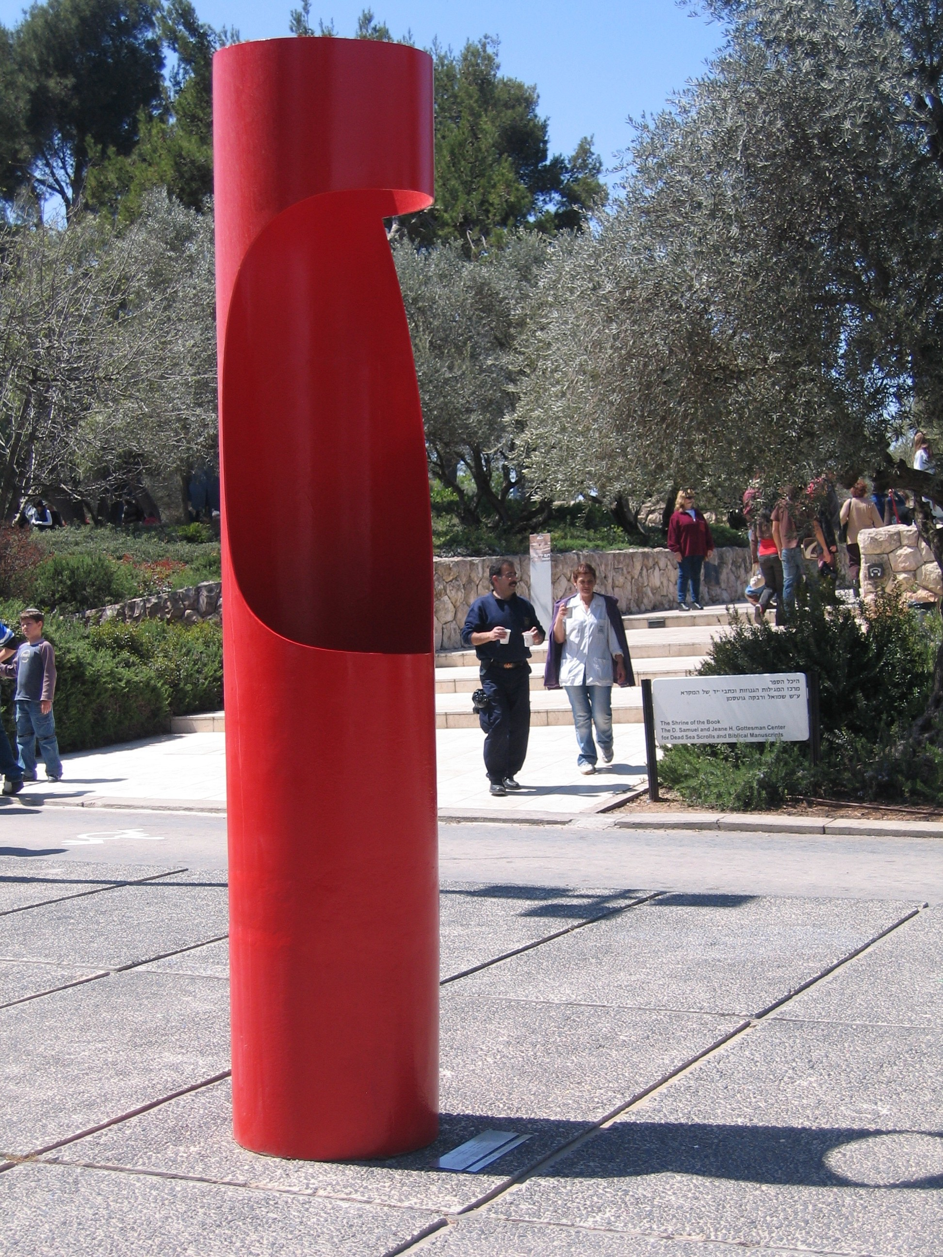 Sculpture